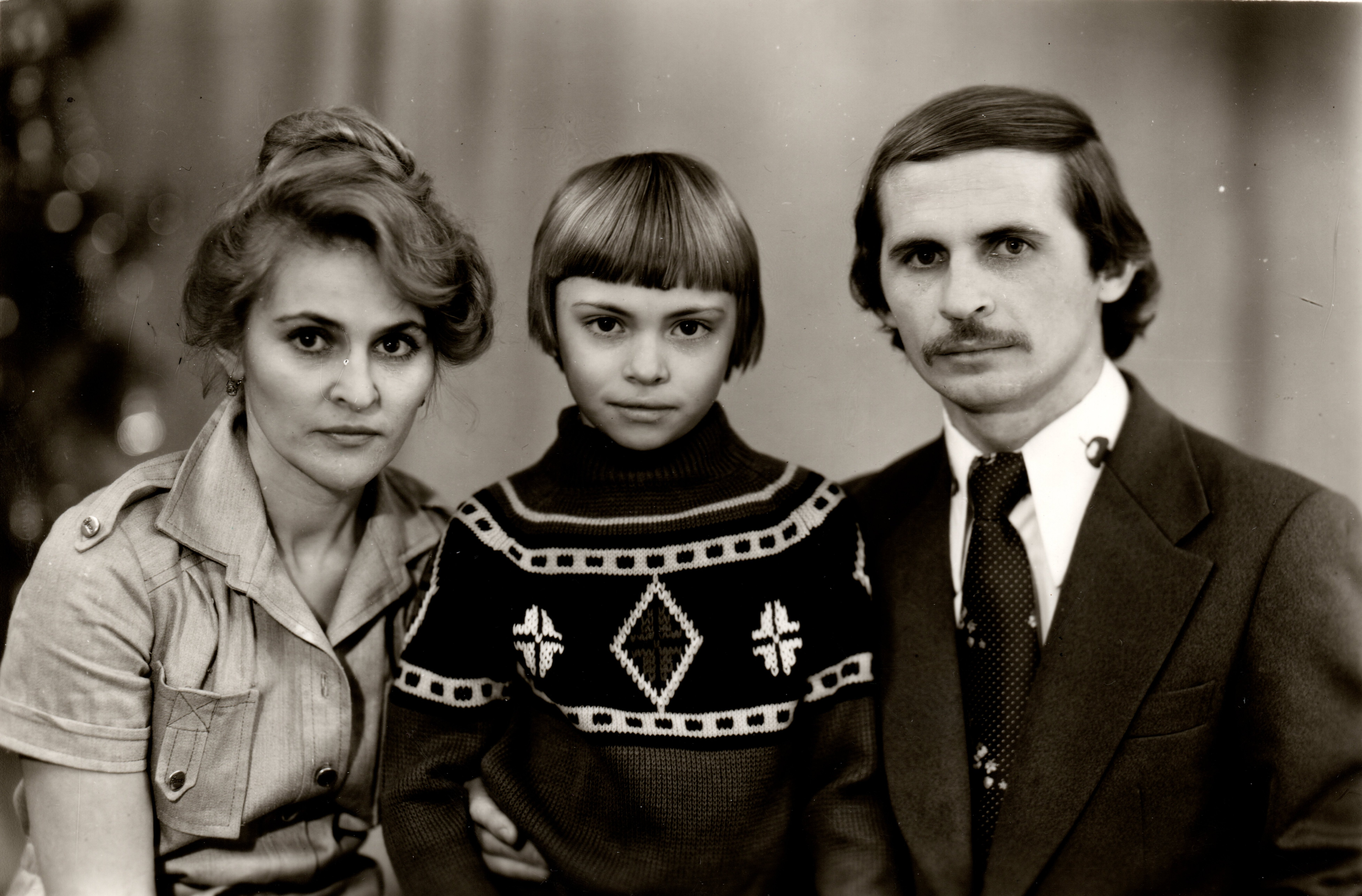 Чоловік Вадим Олександрович та син Геннадій